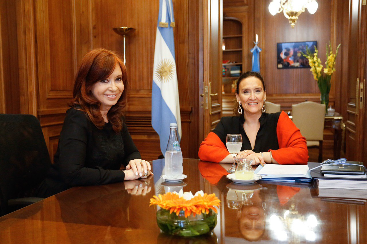 LA TITULAR DEL SENADO, GABRIELA MICHETTI, SE REUNIÓ ESTA TARDE CON LA VICEPRESIDENTA ELECTA CRISTINA FERNÁNDEZ DE KIRCHNER. DURANTE UNA HORA ANALIZARON ASPECTOS VINCULADOS AL TRASPASO. TAMBIÉN SE COORDINARON DETALLES DE LA CEREMONIA DE JURAMENTO DE LA FÓRMULA ELECTA QUE TENDRÁ LUGAR EL 10 DE DICIEMBRE.